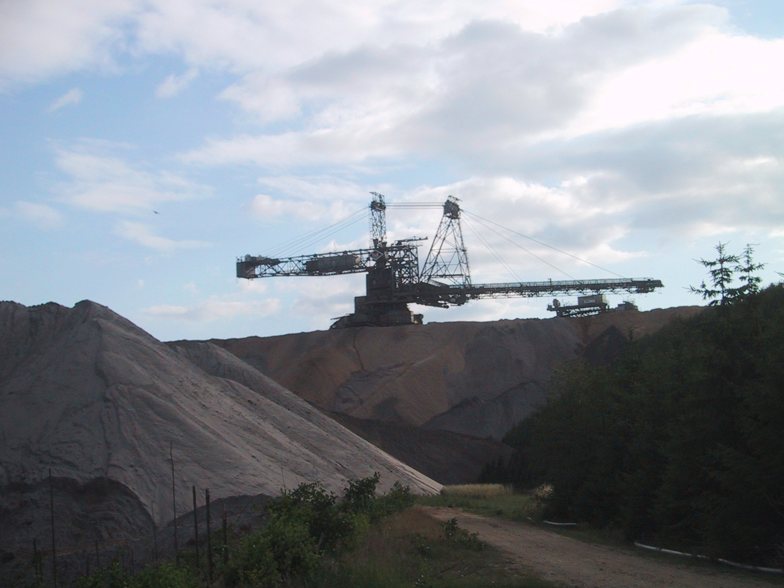 Absetzer am Tagebau Hambach